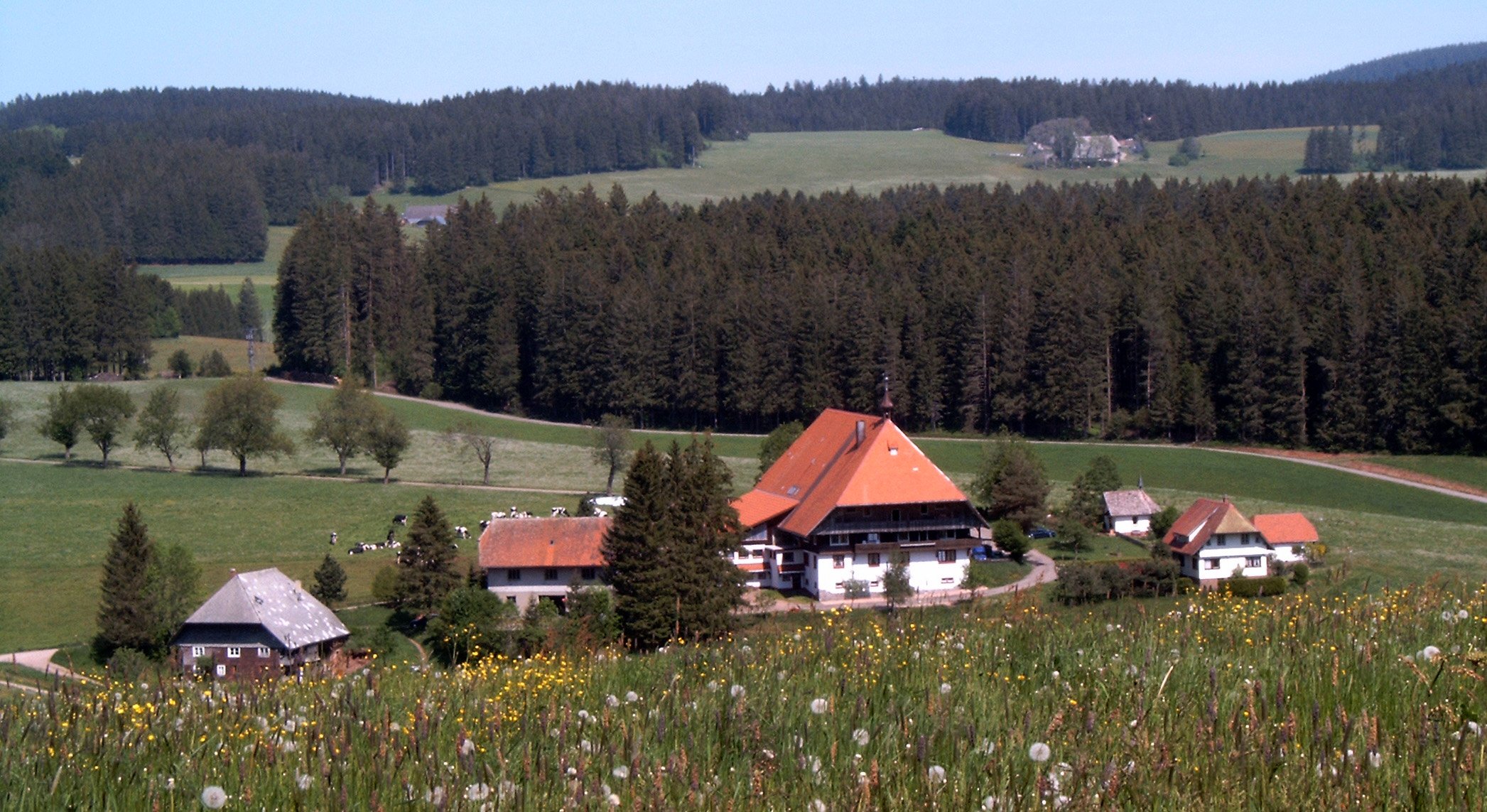 Der Unterfallengrundhof in Furtwangen, bekannt als "Fallerhof" der SWR-Fernsehserie